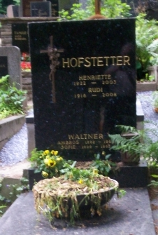 Rudi Hofstetter Grabstätte